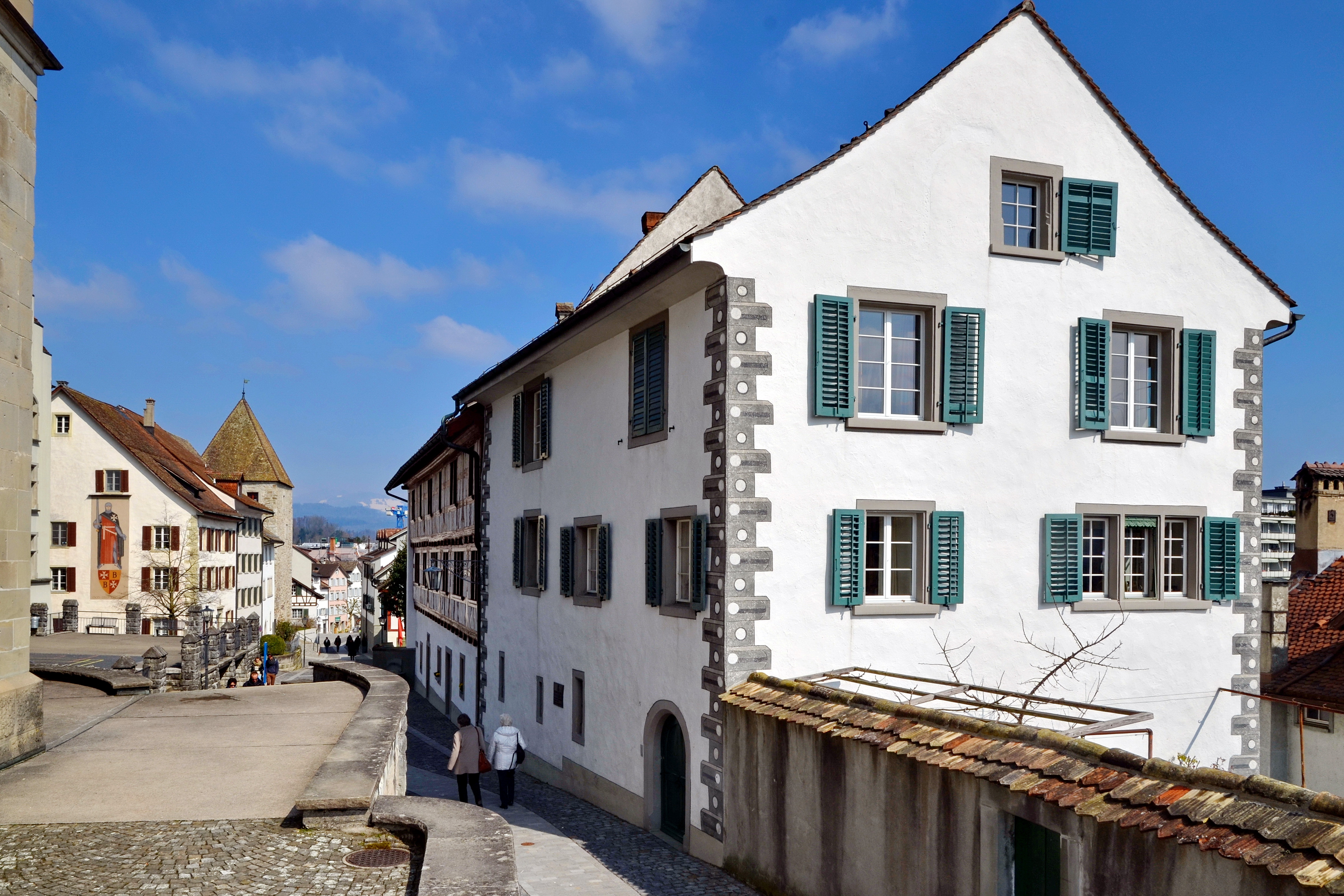 Herrenberg in Rapperswil (Switzerland)